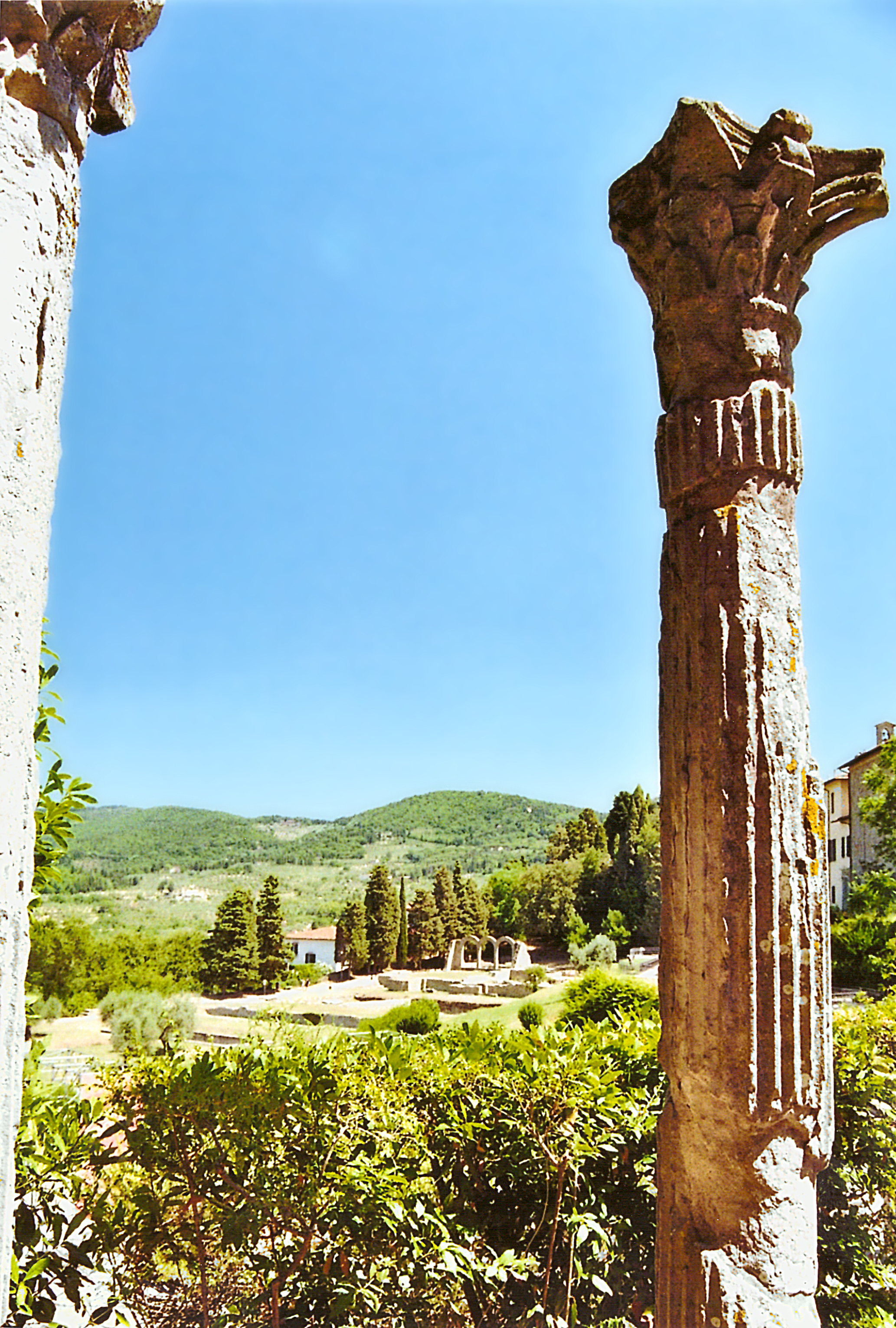 Fiesole (Toskana, Italien) - Archäologische Zone - Blick auf die Thermen.